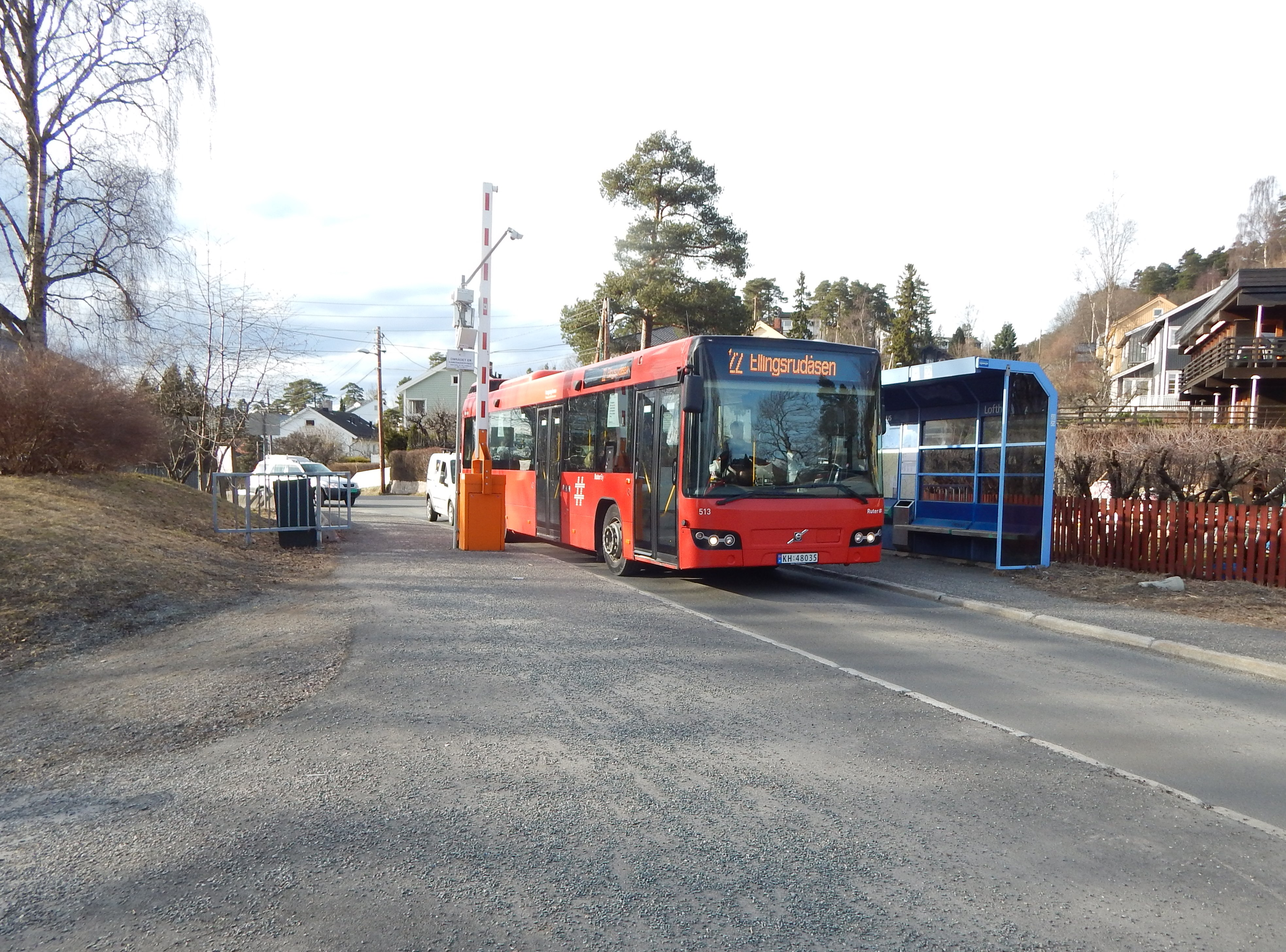 Lofthus bussholdeplass ved Mons Søviks plass